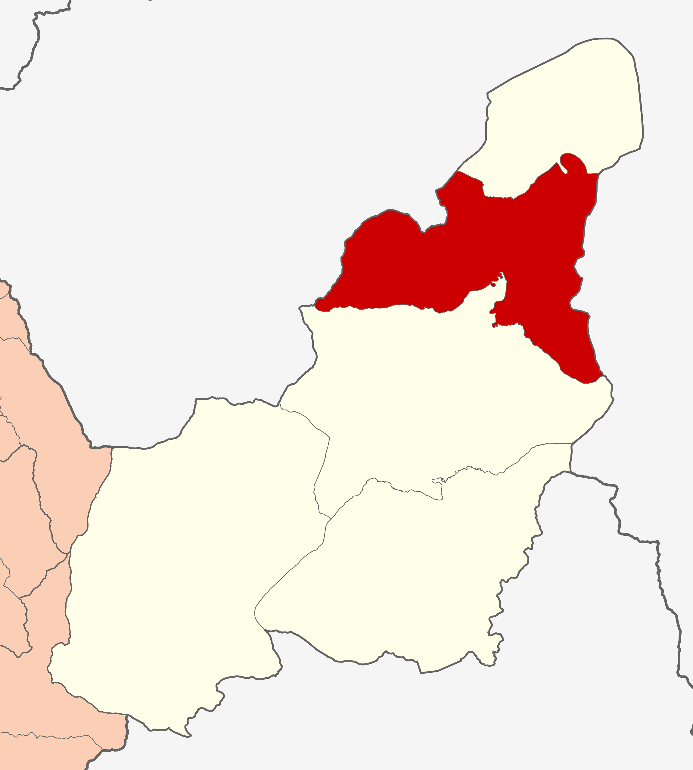 Área del distrito de Tournavista.